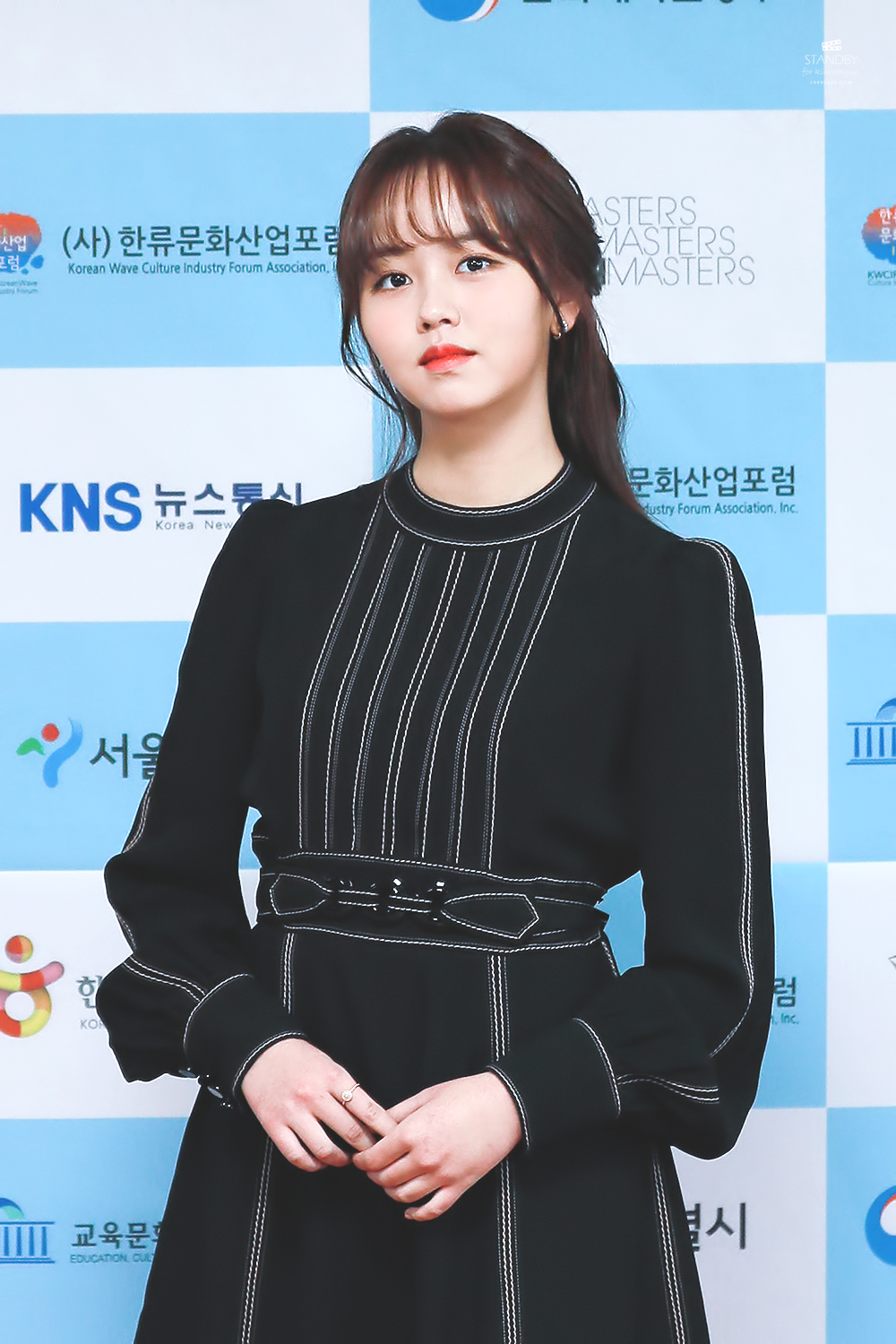 171207 대한민국 한류대상 시상식 김소현 직찍